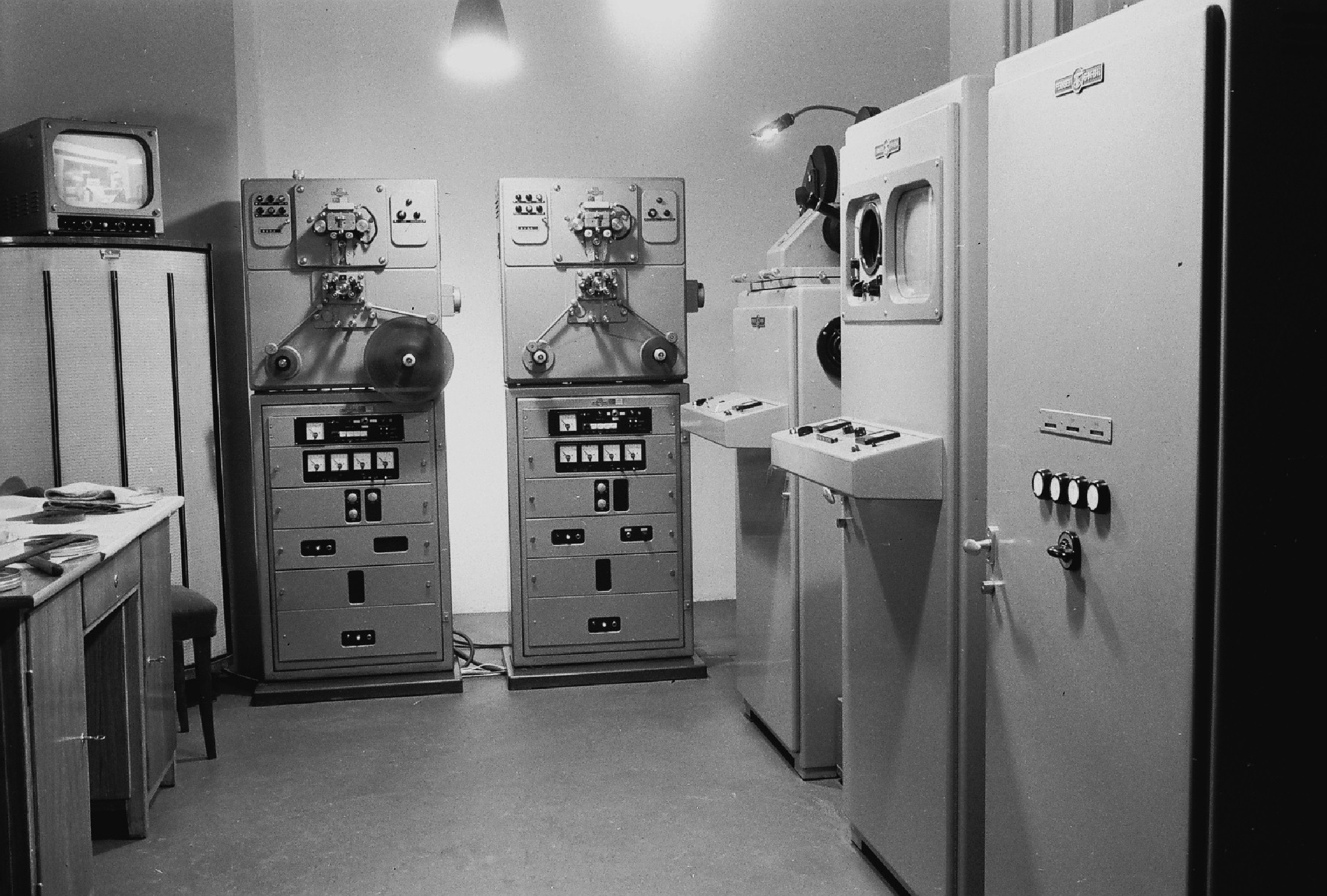 MTV stúdió, Fernseh GmbH gyártmányú kép- és hangrögzítő (telerekorder) berendezés. Location: Hungary, Budapest V. Tags: Hungarian TV, Budapest Title: MTV stúdió, Fernseh GmbH gyártmányú kép- és hangrögzítő (telerekorder) berendezés.